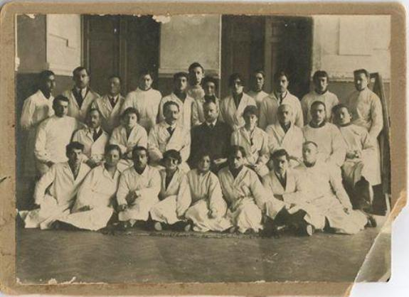 Bakı Universitetinin Tibb fakültəsindəki tələbəlik fotosu, 1923 il.